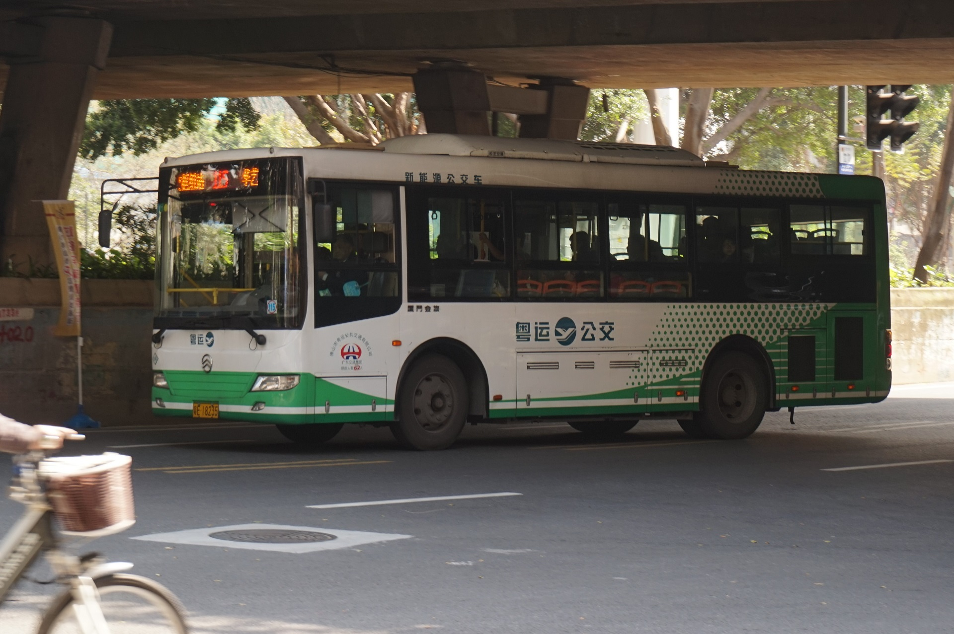 禅城tc涂装